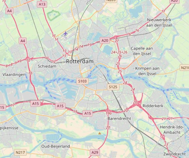 Carte représentant le réseau autoroutier de la ville de Rotterdam.